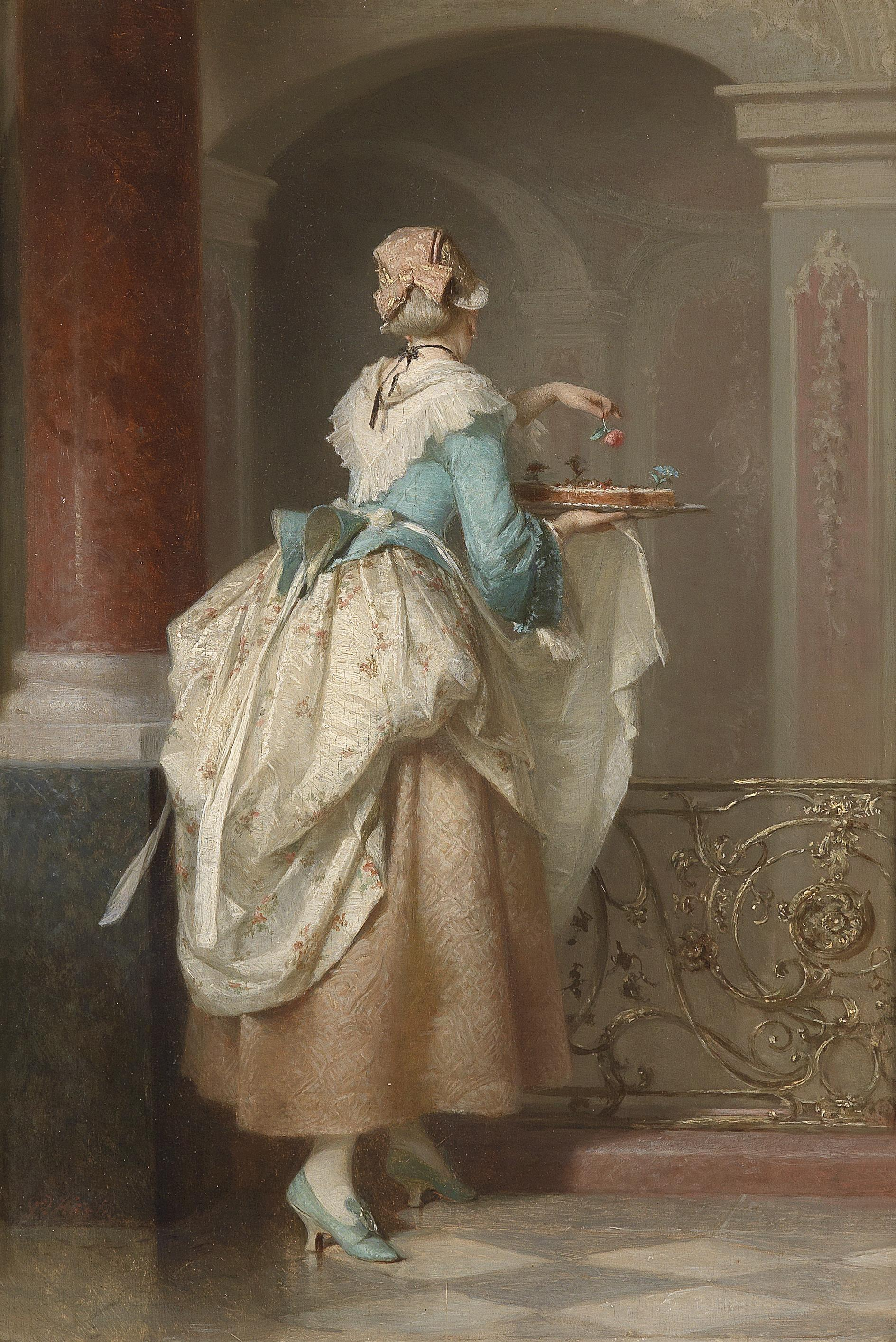 Die Geburtstagstorte, signiert P. Koerle, Öl auf Holz, 41,5 x 27 cm